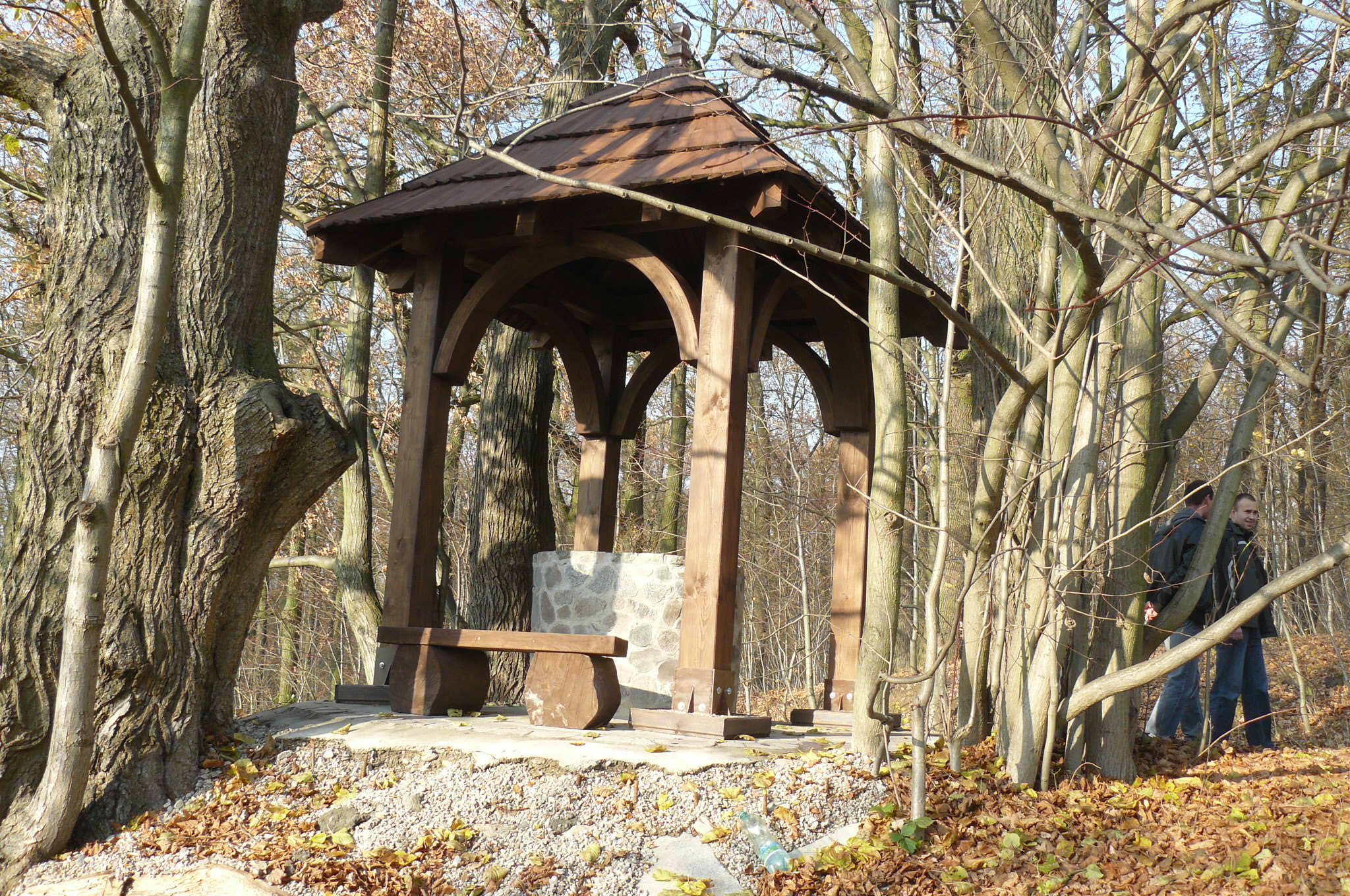 Well of Napoleon in Mosina.